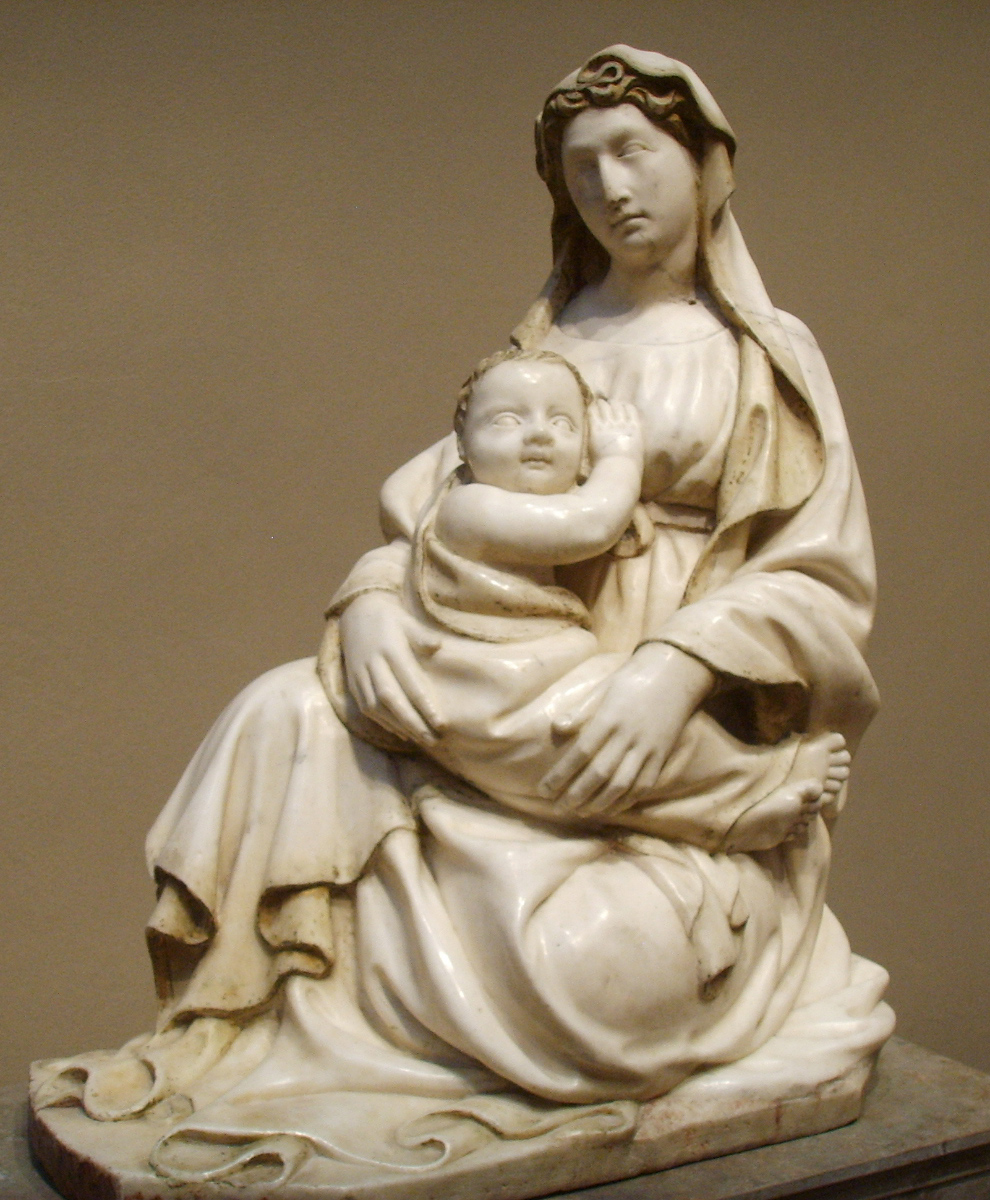 National gallery in washington d.c., jacopo della quercia, madonna dell'umiltà, 1400 circa